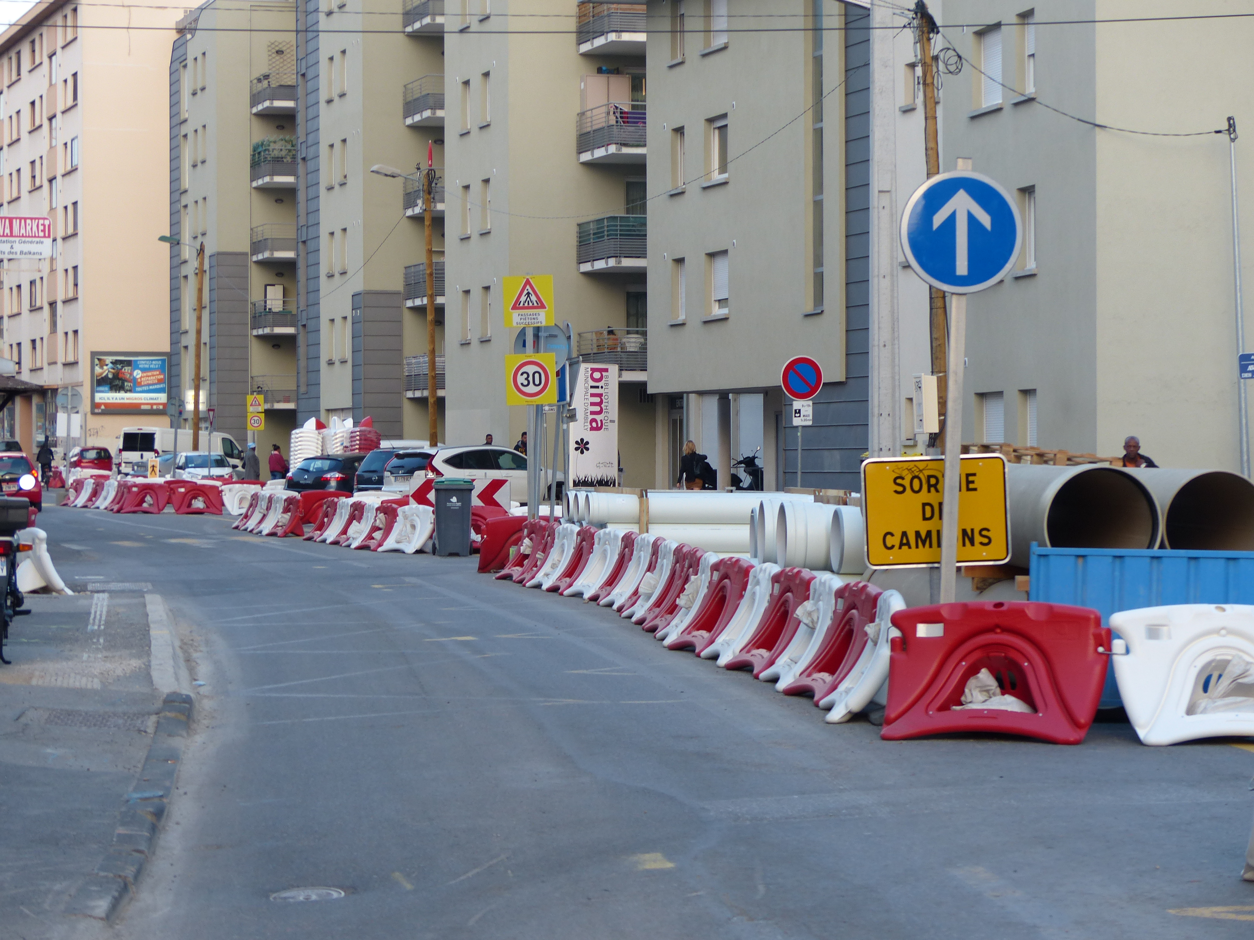 Travaux de construction du tram, rue de Genève, Ambilly, Haute-Savoie, France. Panneaux B21b, KC1 sortie de camions, et séparateurs K16 visibles.